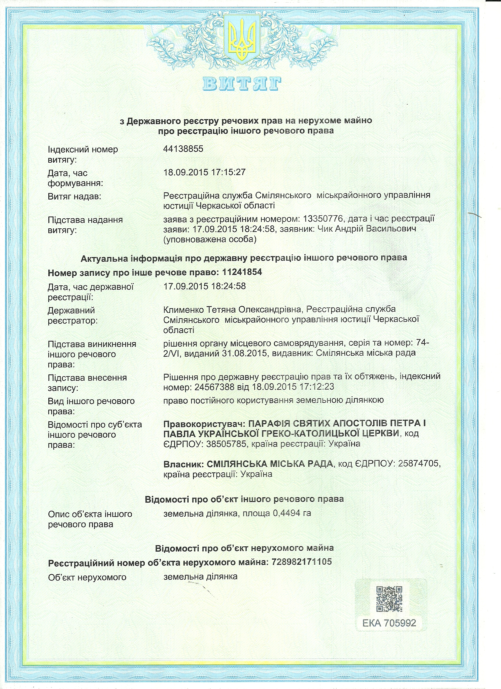 такий документ підійде для підтвердження ?